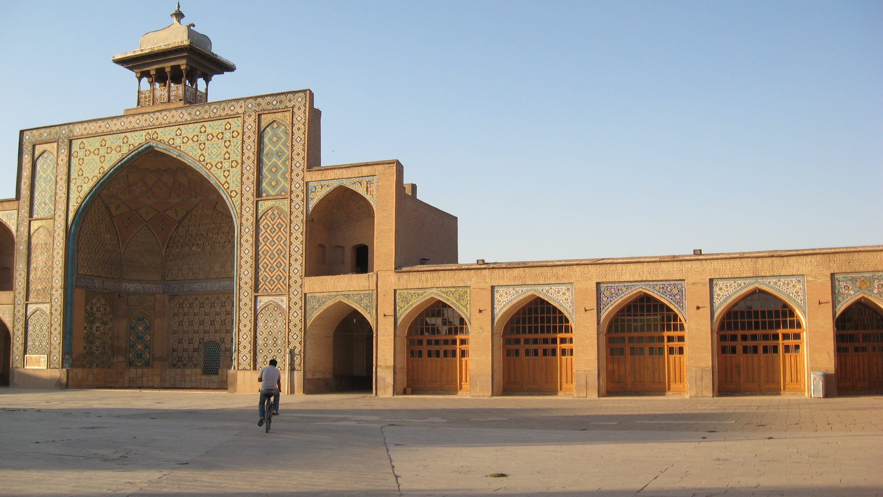 مسجد النبی قزوین - حیاط اصلی